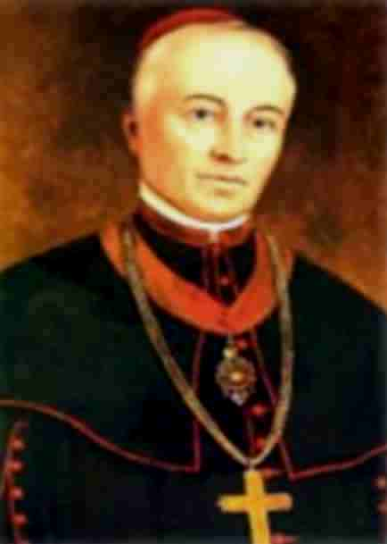 Jozef Gaganecz, 1793-1875, Griechisch-katholischer Bischof der Eparchie Presov (1842-1875)